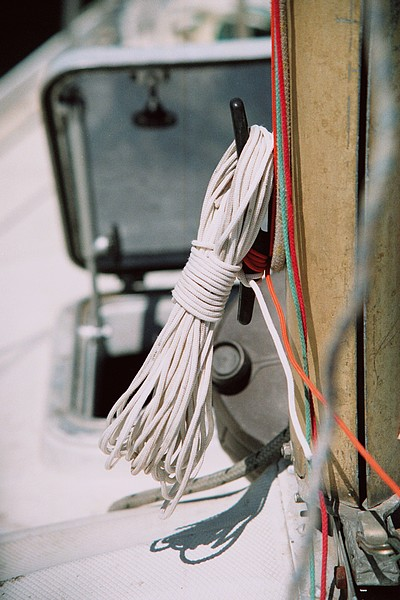 dünne aufgeschossene Leine, an Klampe am Mast